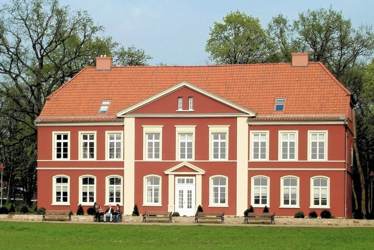 Die Thaersche Villa, gesehen von den Dammaschwiesen in Celle